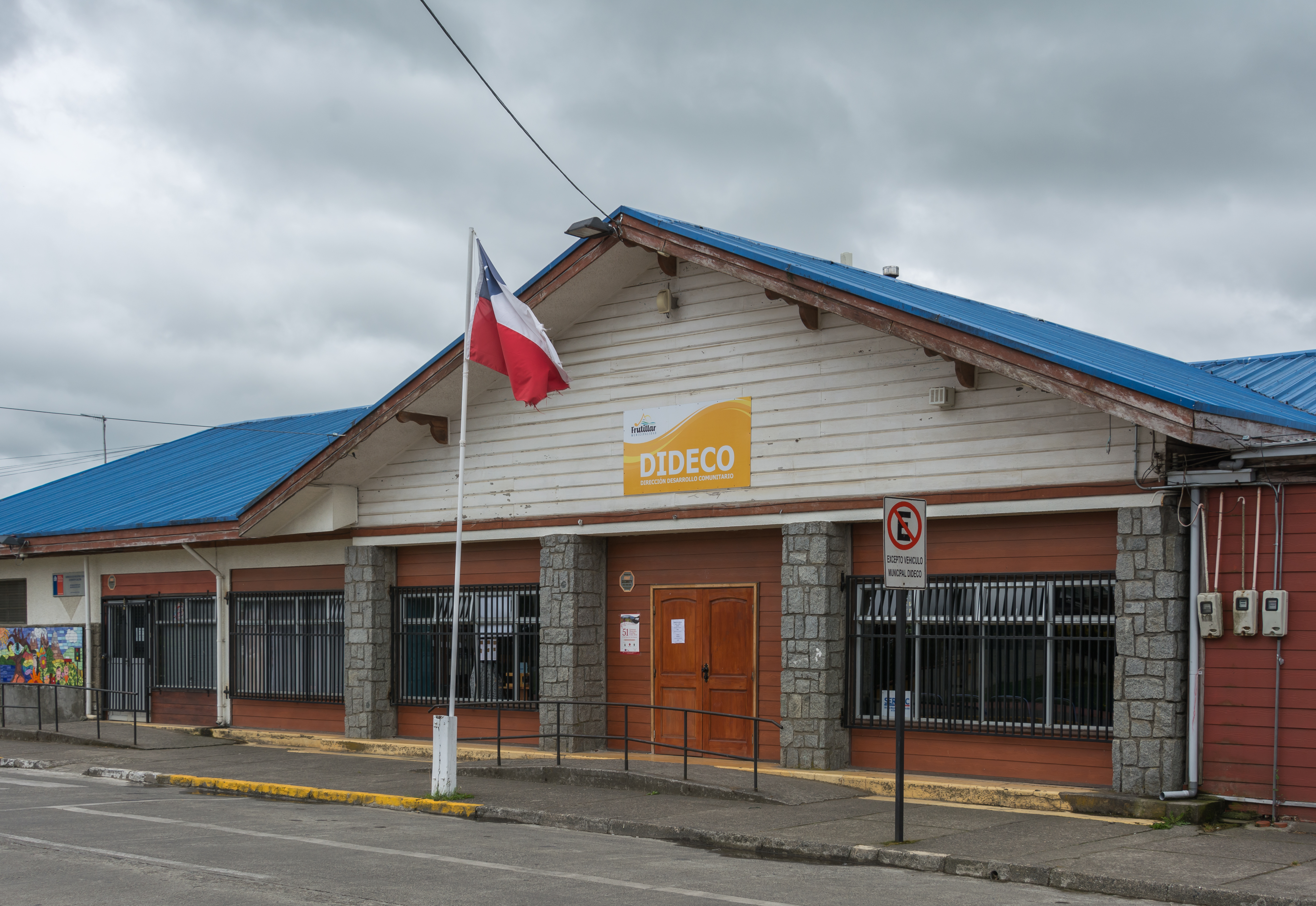 Estación Frutillar, Frutillar, Región de Los Lagos, Chile.